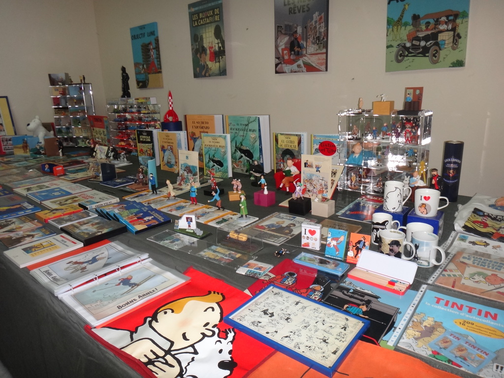 Exhibición de coleccionismo de Tintin